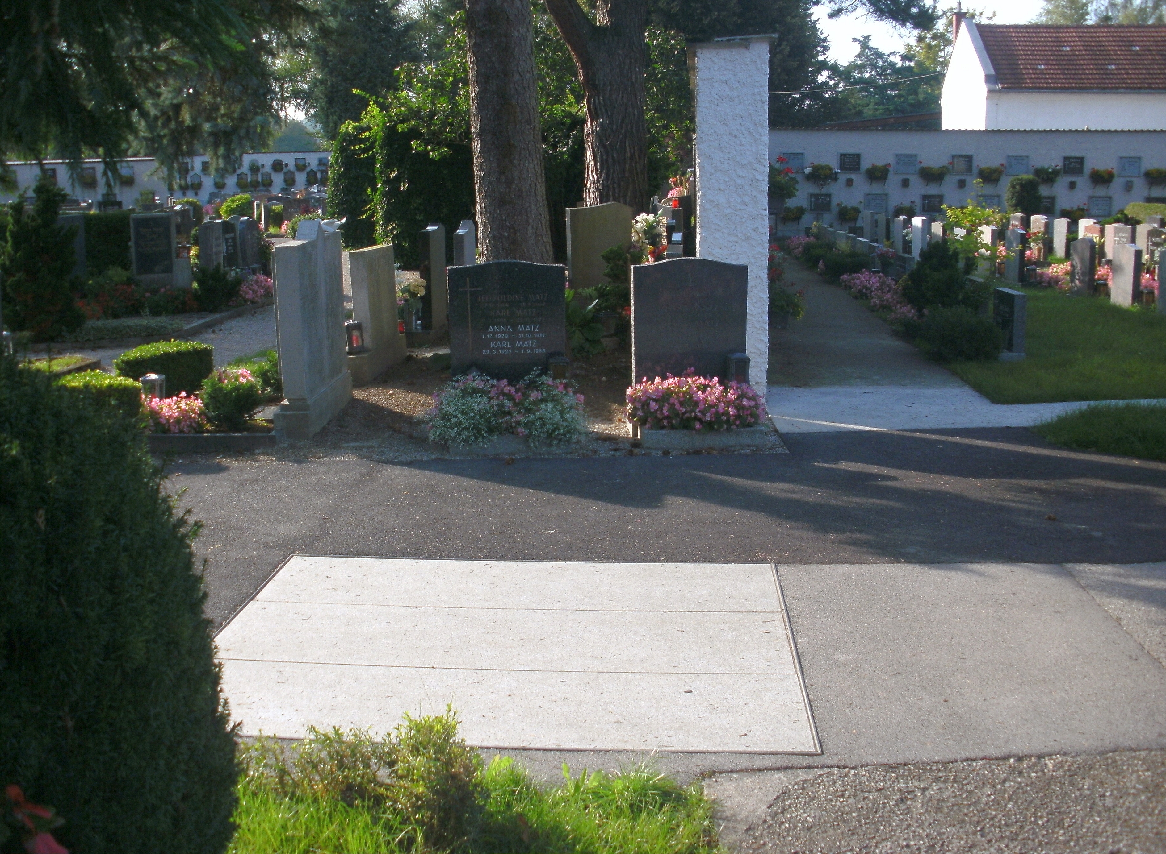 Steyr, Urnenfriedhof am Tabor: Urnenort der KZ-Häftlinge. Die Urnen jener KZ-Häftlinge, die während der Zeit des Nationalsozialismus im Krematorium Steyr eingeäschert worden waren, wurden zunächst in einem Holzschuppen aufbewahrt. 1948 wurden die Urnen am Ende eines Verbindungsweges bei der Einfriedungsmauer des Friedhofes versenkt. Als später der Friedhof erweitert wurde, wurde die Friedhofsmauer an dieser Stelle teils entfernt, der Verbindungsweg verlängert und der Weg asphaltiert, wodurch der Urnenort der KZ-Häftlinge in Vergessenheit geriet. 2011 wurden die Urnen wiedergefunden, heute zeigt der Verbindungsweg eine dreiteilige Schachtabdeckung aus Granit.